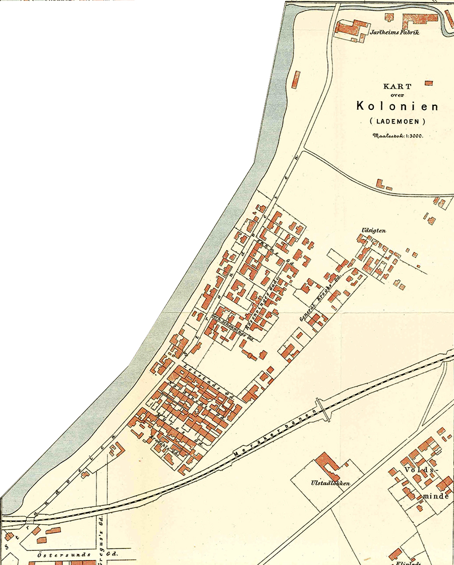 Kart over Lademoen, Trondheim, 1898